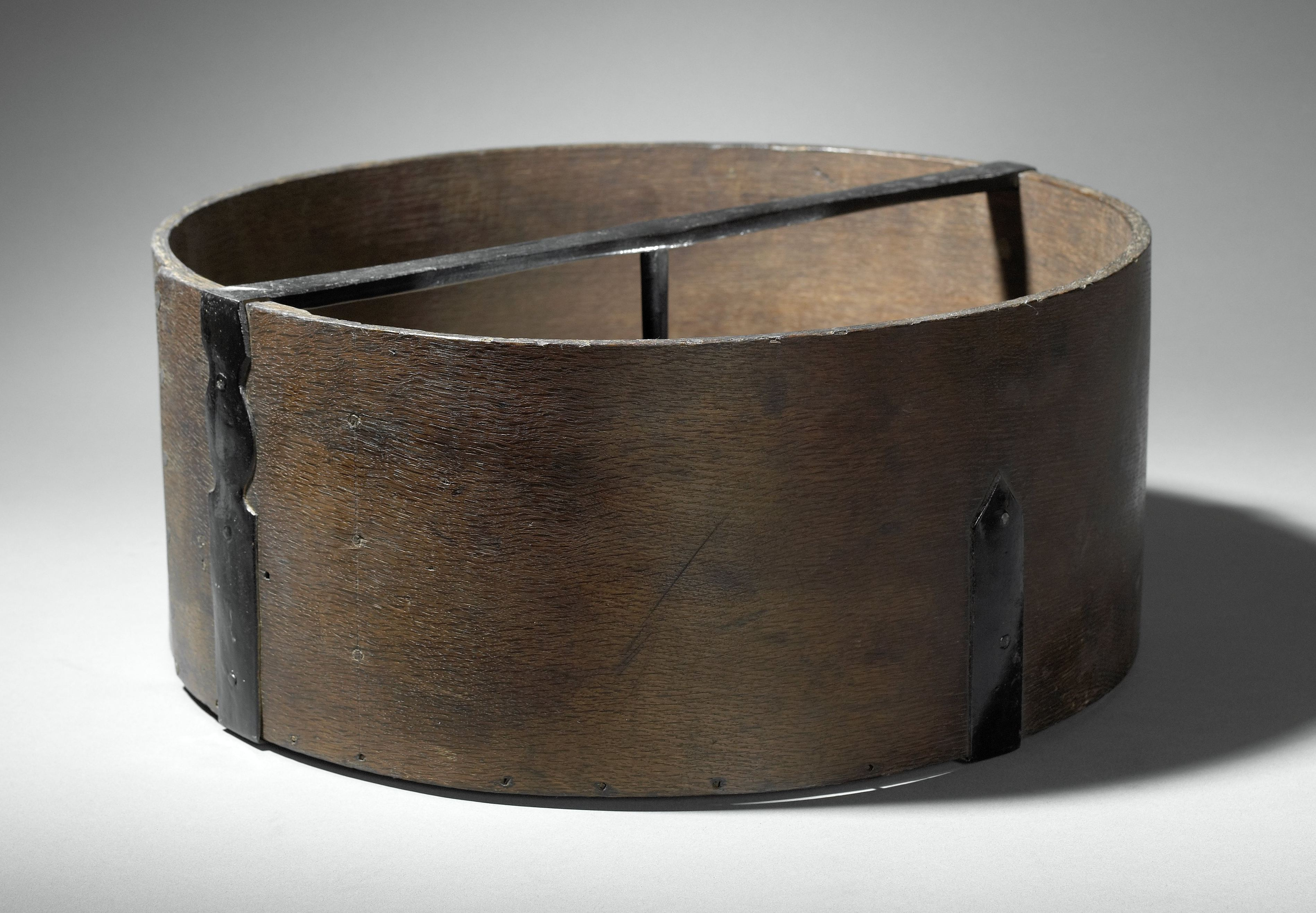 IdentificatieTitel(s): 1/2 Schepel uit EnkhuizenObjecttype: inhoudsmaat droge waren Objectnummer: NG-2001-16-A-40Opschriften / Merken: nummer, etiket buitenzijde: ‘38’titel, etiket binnenzijde: ‘Enkhuyzen 1/2 Schepel, zijnde 1/4 van een zak’titel, etiket buitenzijde: ‘d'Enkhuyzen 1/2 Boisseau’Omschrijving: Spanen en ijzeren inhoudsmaat voor droge waren met brug en stijl van 1/2 schepel, v.z.v. etiketten.VervaardigingVervaardiger: anoniemPlaats vervaardiging: EnkhuizenDatering: ca. 1800Materiaal: hout ijzer Afmetingen: h 17 cm. × d 40 cm. OnderwerpWanneer: 1780 - 1830Waar: EnkhuizenVerwerving en rechtenVerwerving: overdracht van beheer 26-nov-2001Copyright: Publiek domein